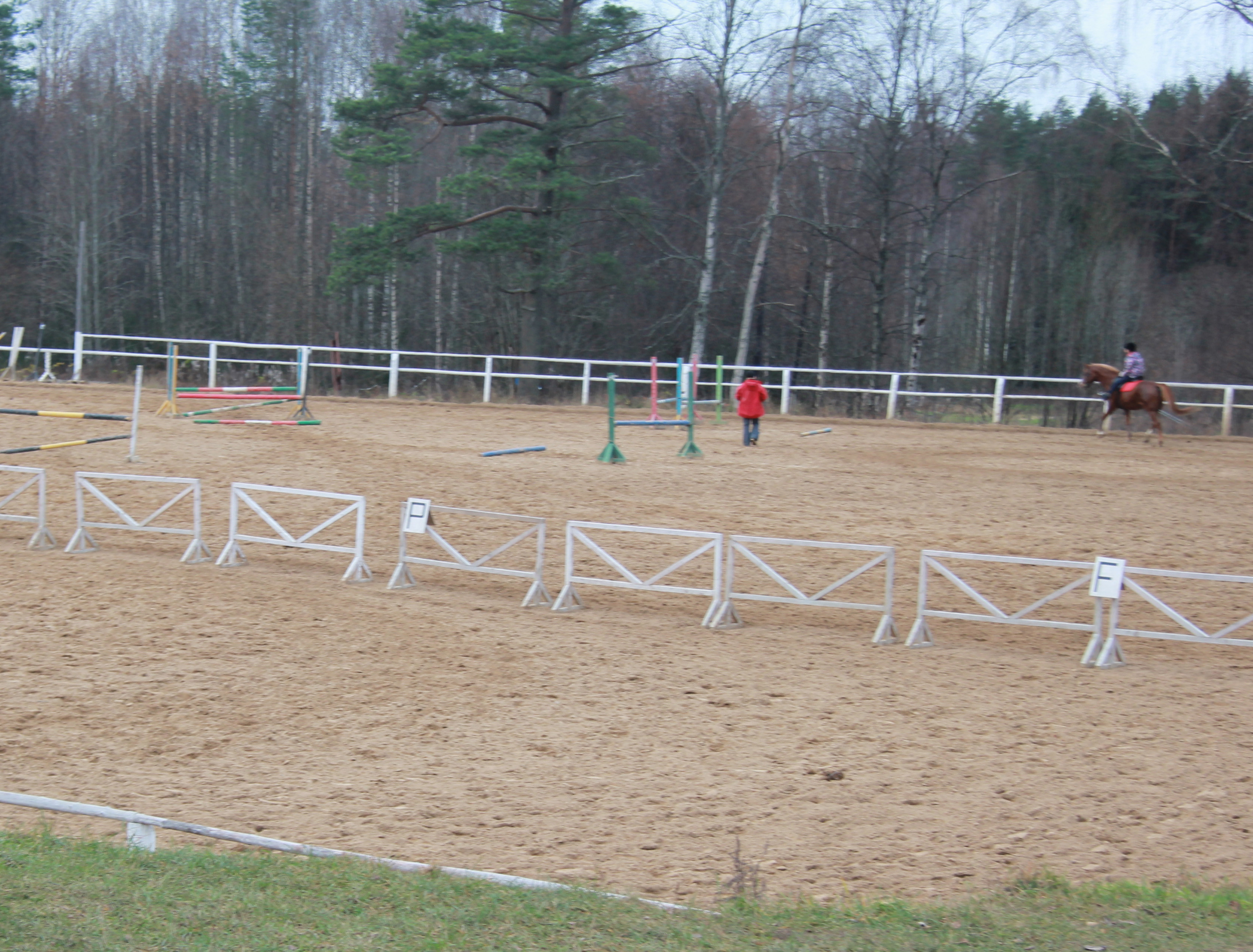 У зубровника